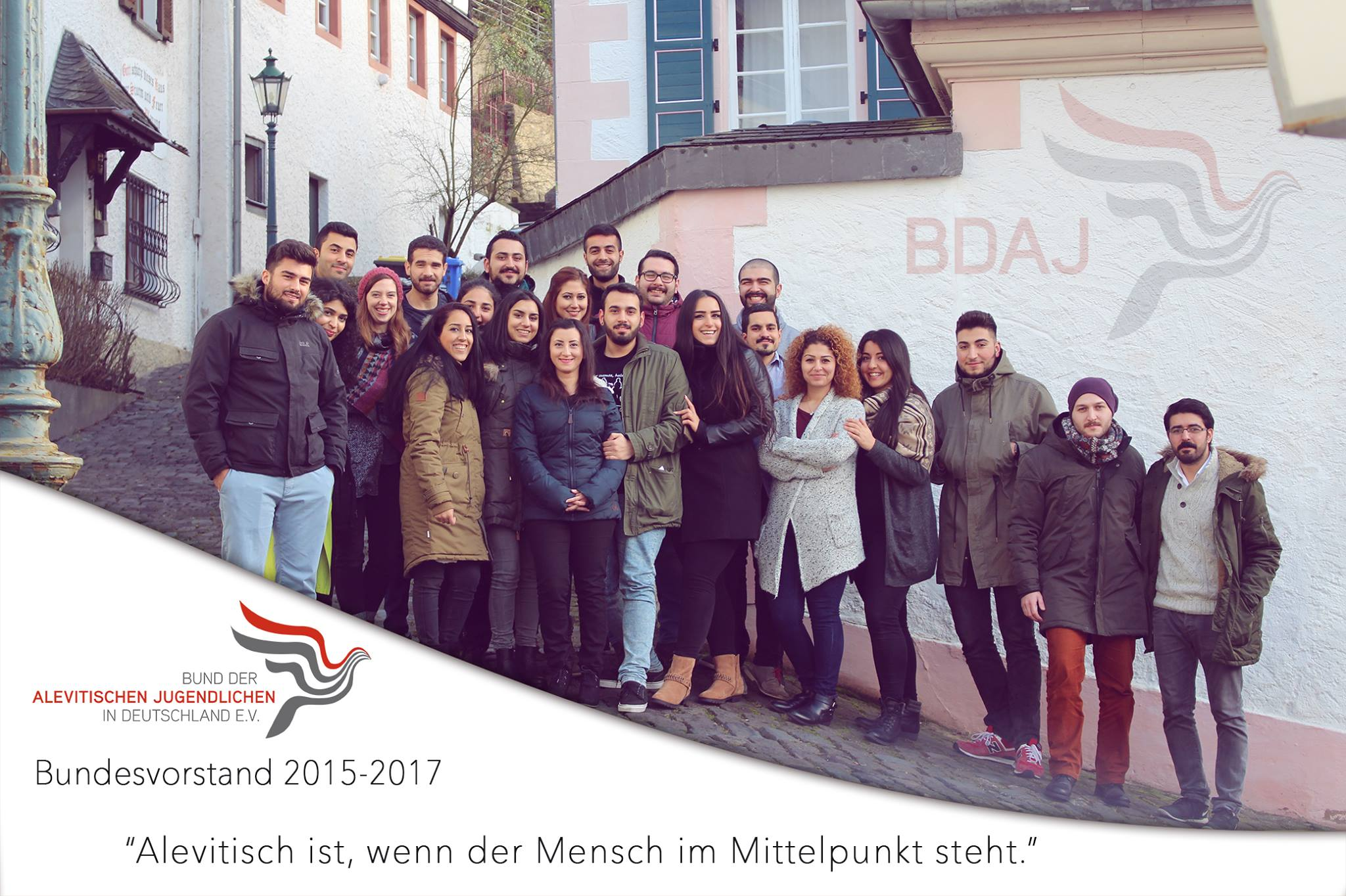 Die Bundesebene auf der ersten Bundesvorstandssitzung.